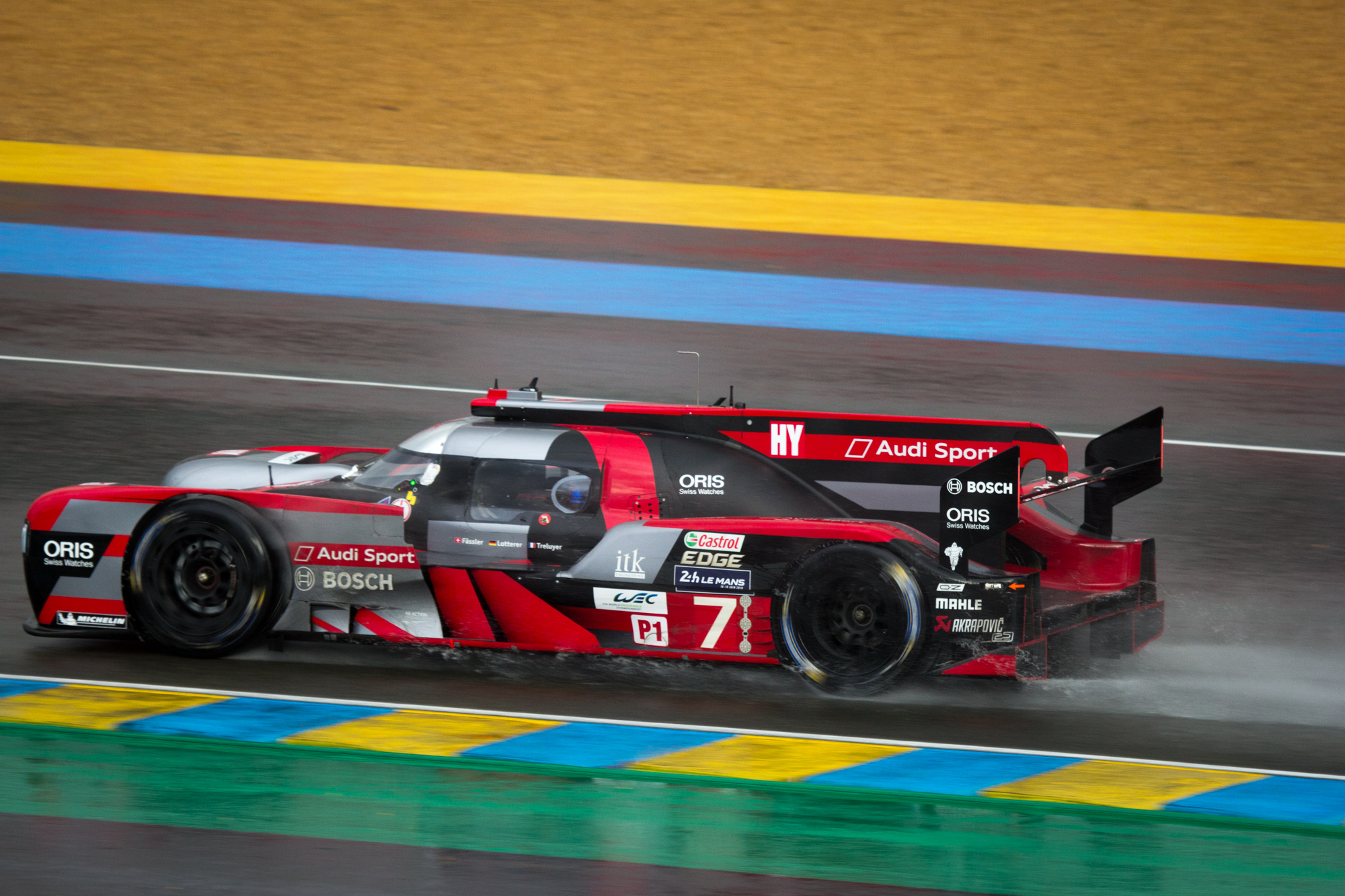 Drivers: Marcel Fässler, André Lotterer, Benoît Tréluyer